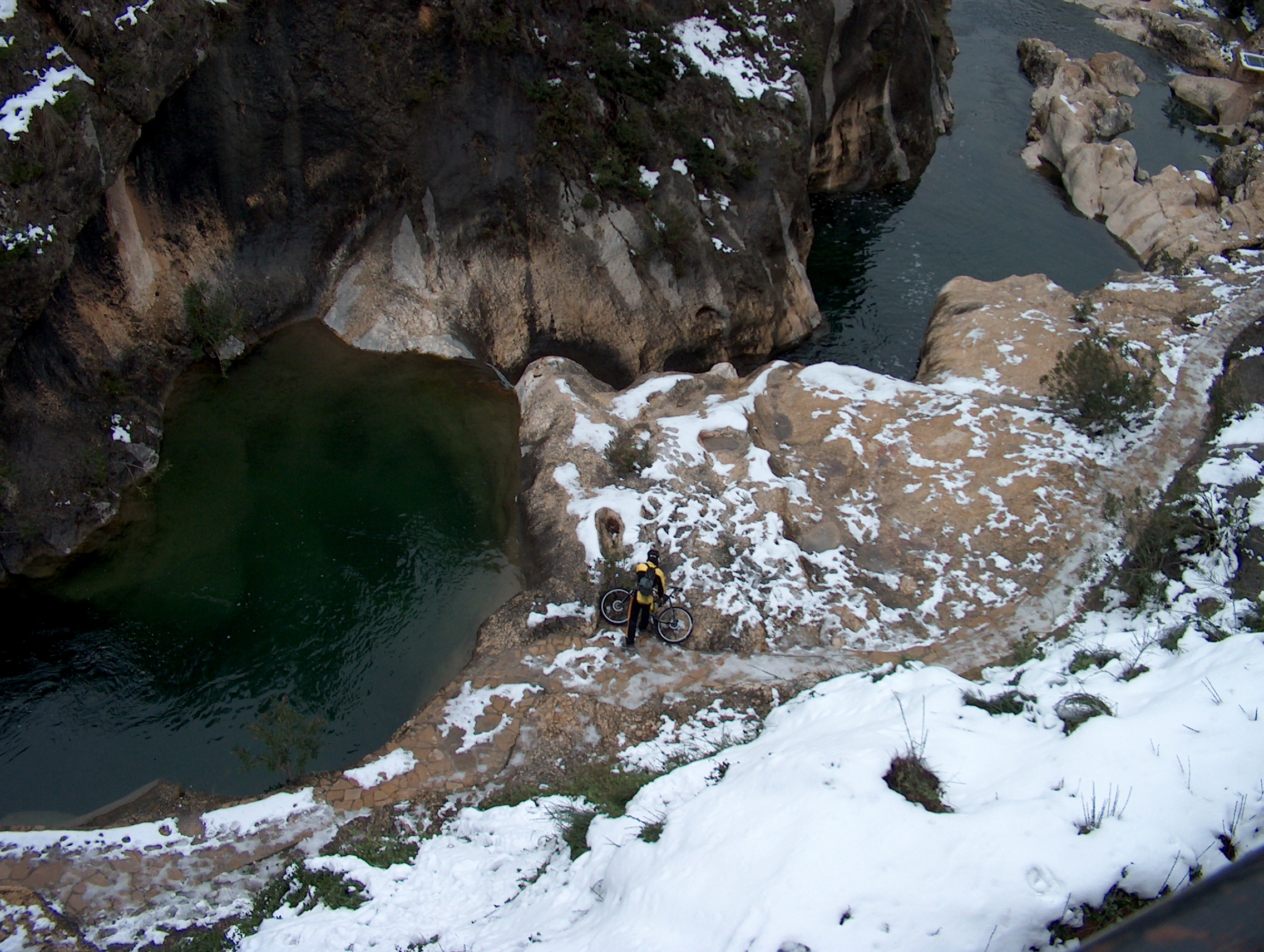 Pou clar en la nevada de 2005